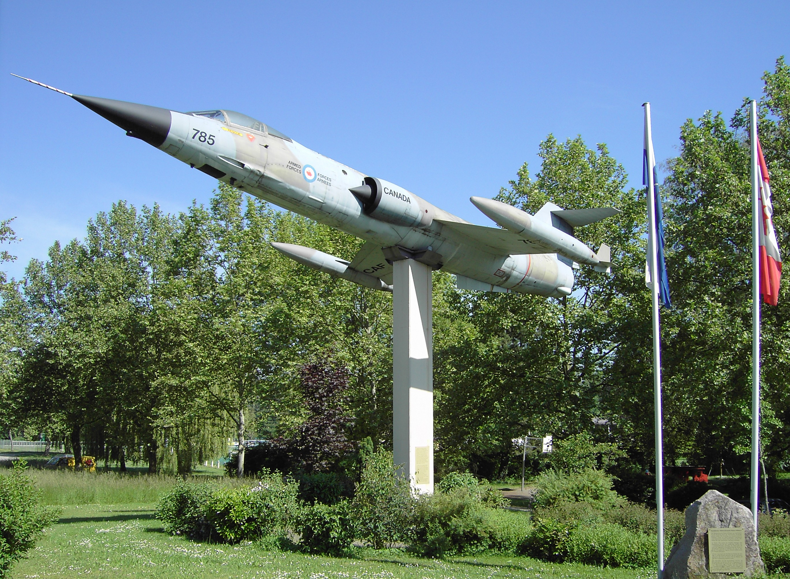 Starfighter